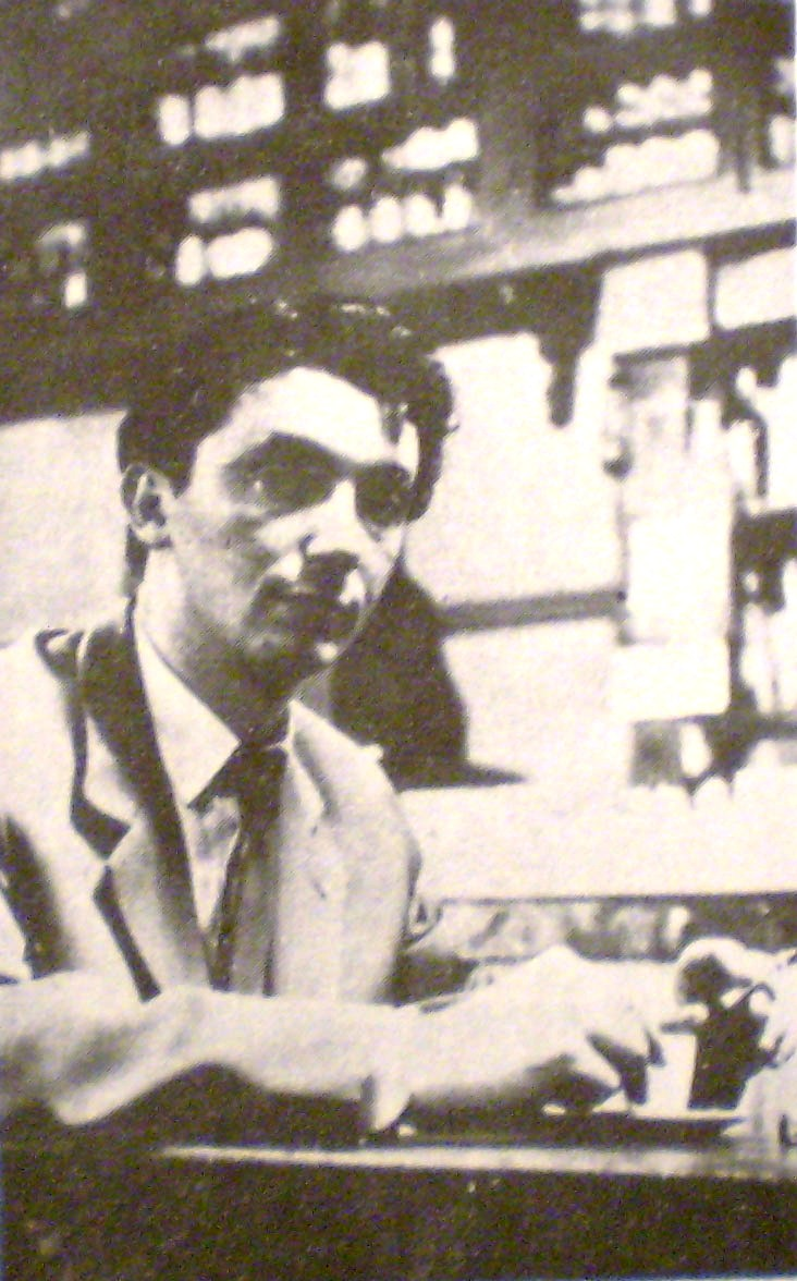 Osvaldo Dragún